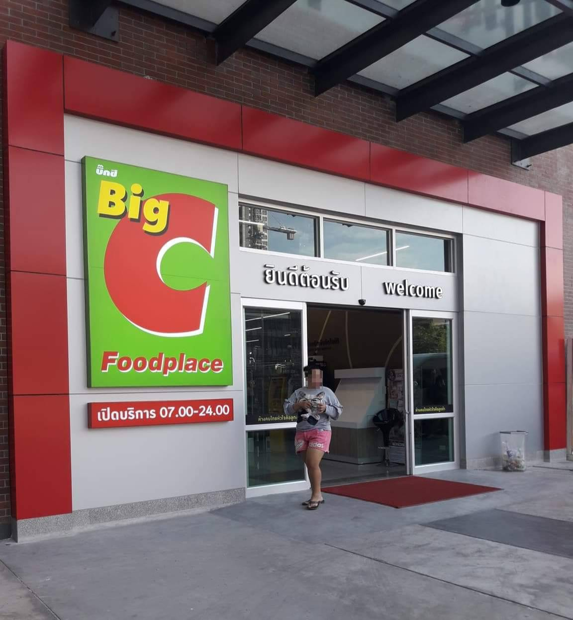 บิ๊กซี ฟู๊ดเพลส สาขา เกทเวย์ แอท บางซื่อ